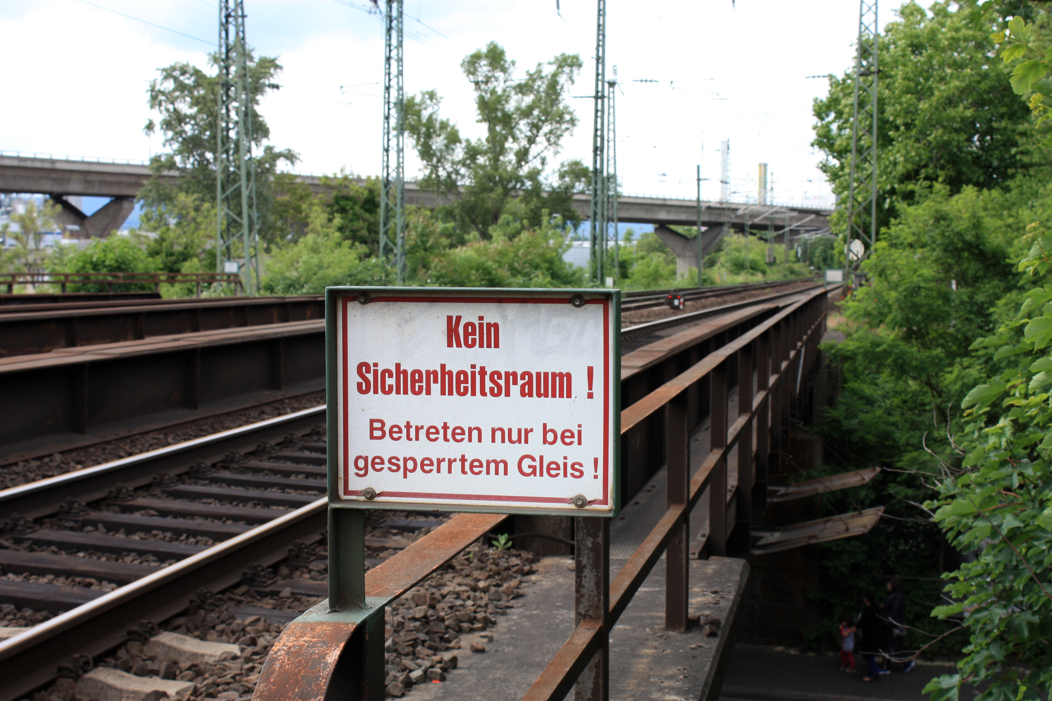 Eisenbahnbrücke Hattenbergstraße in Mainz. Linke Rheinstrecke zwischen Mainz Hauptbahnhof und Mainz Mombach. Unten verläuft die Hattenbergstraße. Im Hintergrund die Mombacher Hochstraße (Spannbetonbrücke). Das Hinweisschild beinhaltet den Text "Kein Sicherheitsraum! Betreten nur bei gesperrtem Gleis!". Das Schild weist den Bahnmitarbeiter darauf hin, dass bei Betreten der Brücke der Sicherheitsabstand zu vorbei fahrendem Zugverkehr zu gering ist. Das Betreten der Brücke ist daher nur erlaubt, wenn die Bahnstrecke für den Zugverkehr gesperrt ist. Die Aufnahme entstand am 31.05.2015 als Teil einer Fotoserie zum Mainzer Nordkopf. IMG 7644